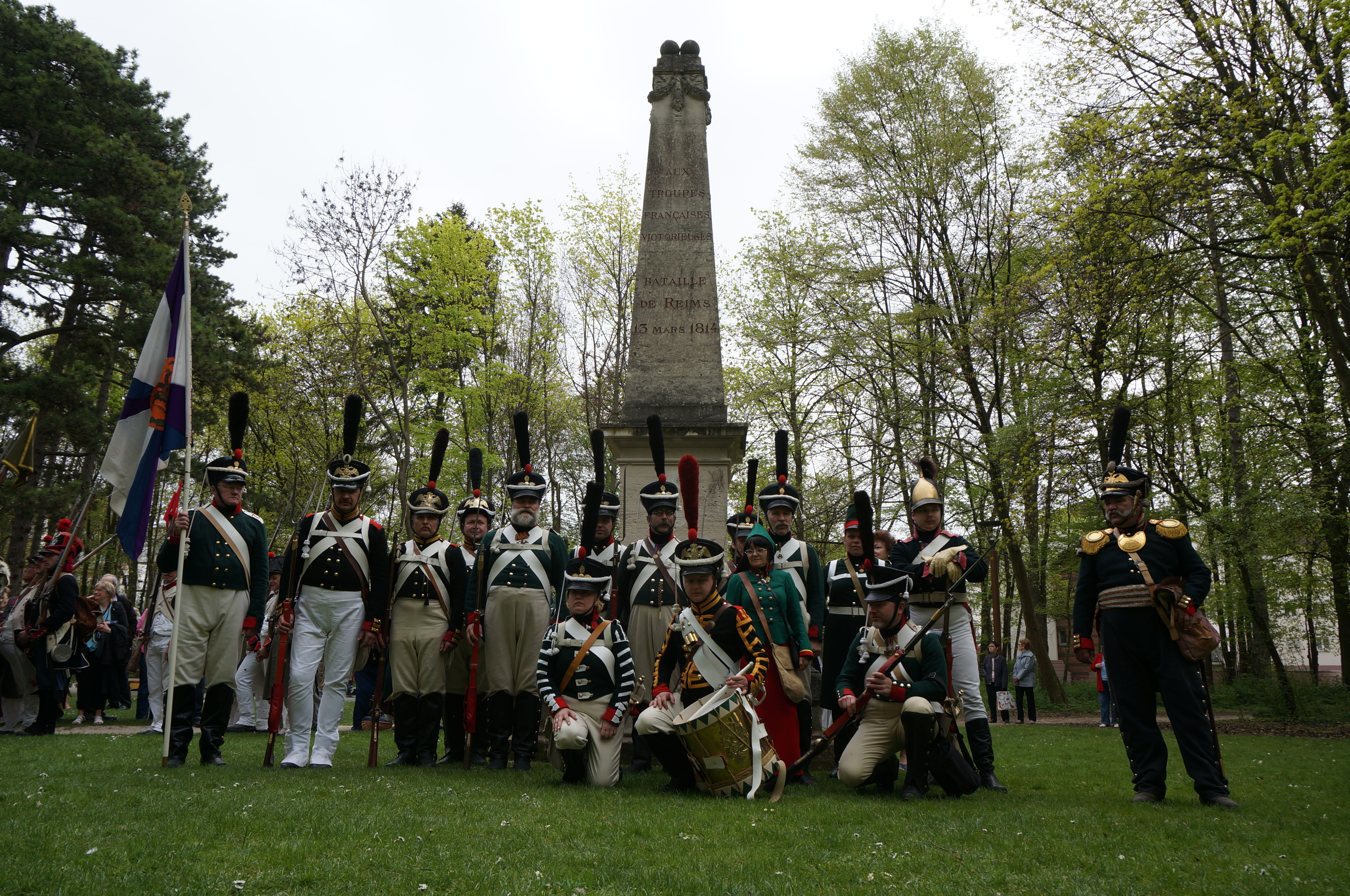 Lors du bi-centenaire de la bataille de Reims, unitée russe.